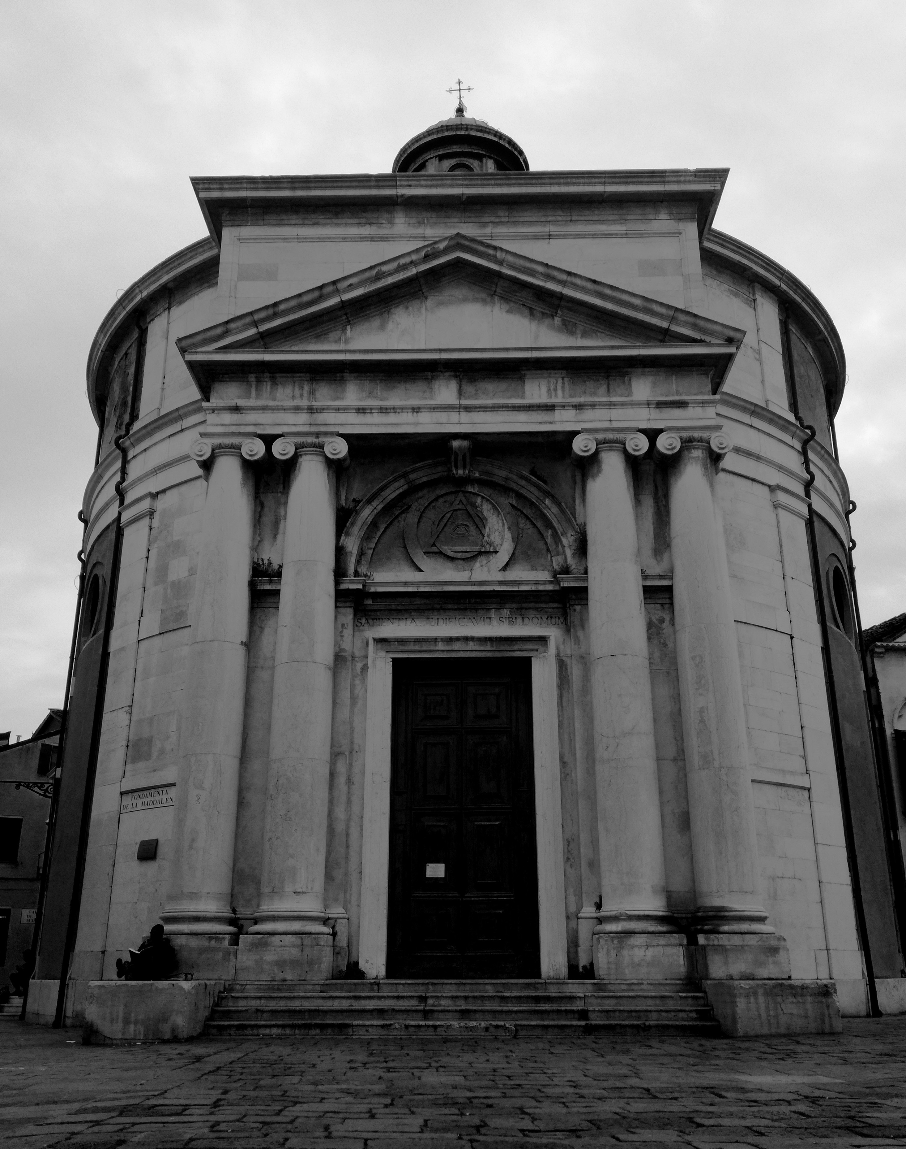 Visione frontale (foto di E.Neri)